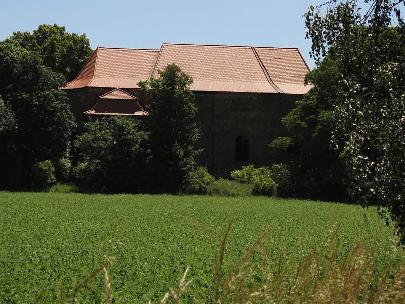 Kostel Nejsvětější Trojice, Nové Sedliště.